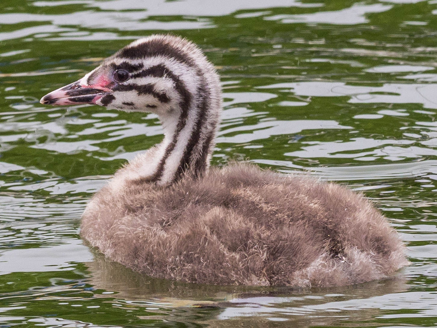 Podiceps cristatus